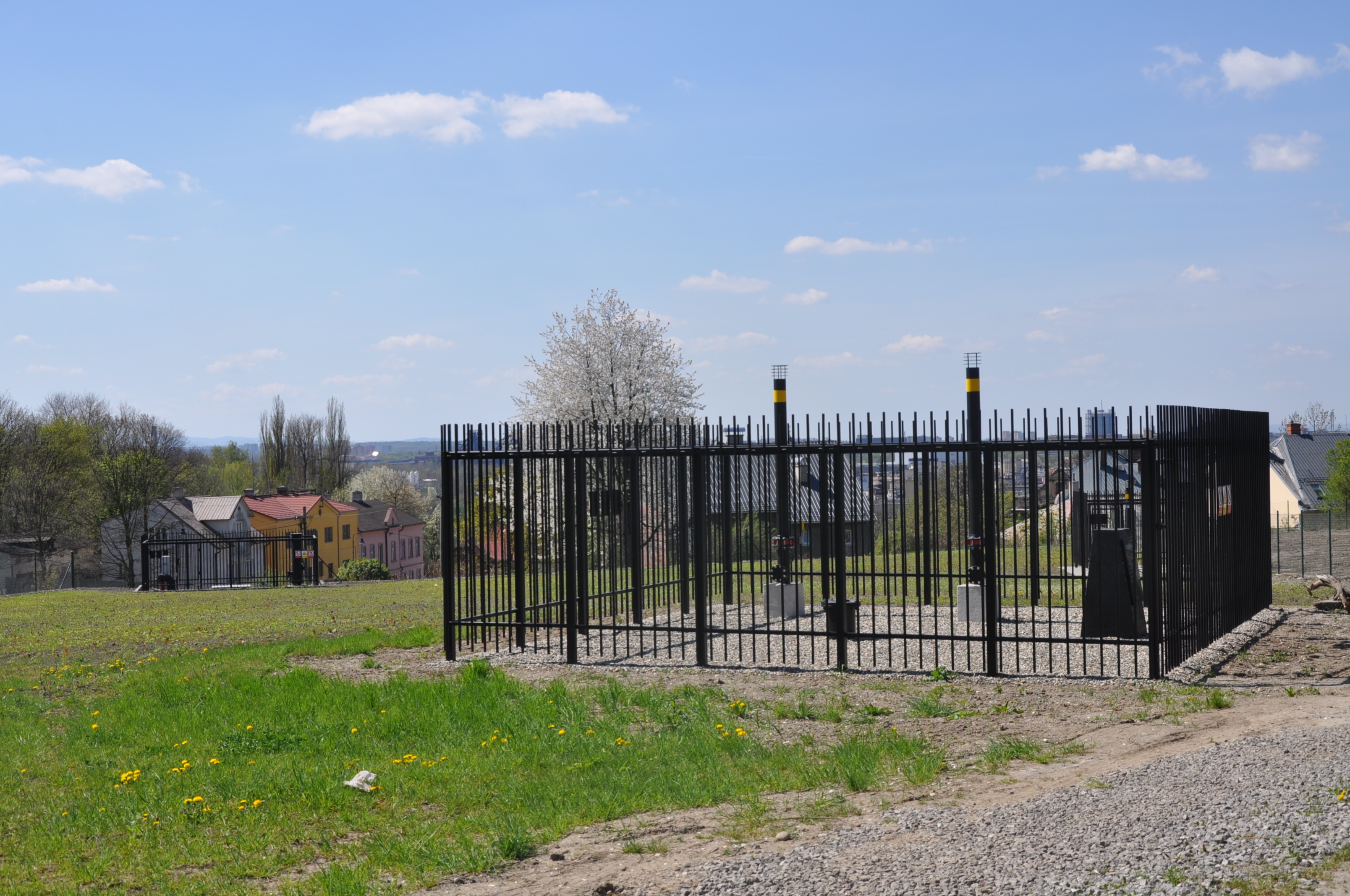 Důl Jindřich, Slezská Ostrava, pohled směrem k jámě Schodová a Světlík V